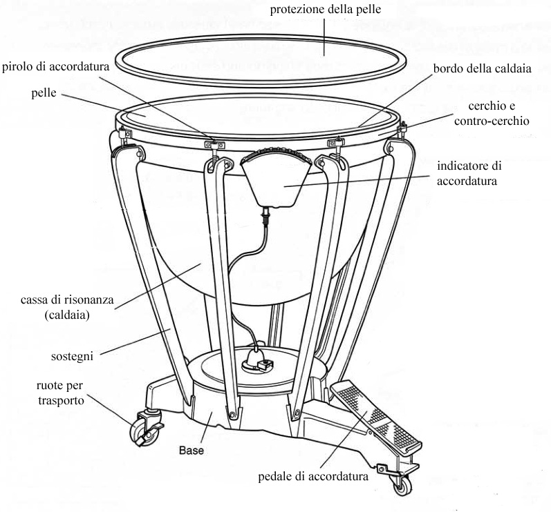 Timpani e descrizione delle parti. Il timpano è un organo del corpo.